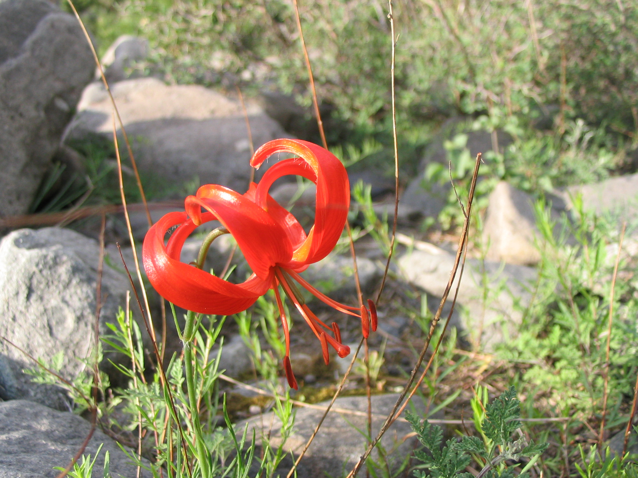 山丹丹，摄于贺兰山东麓，大水沟谷底。